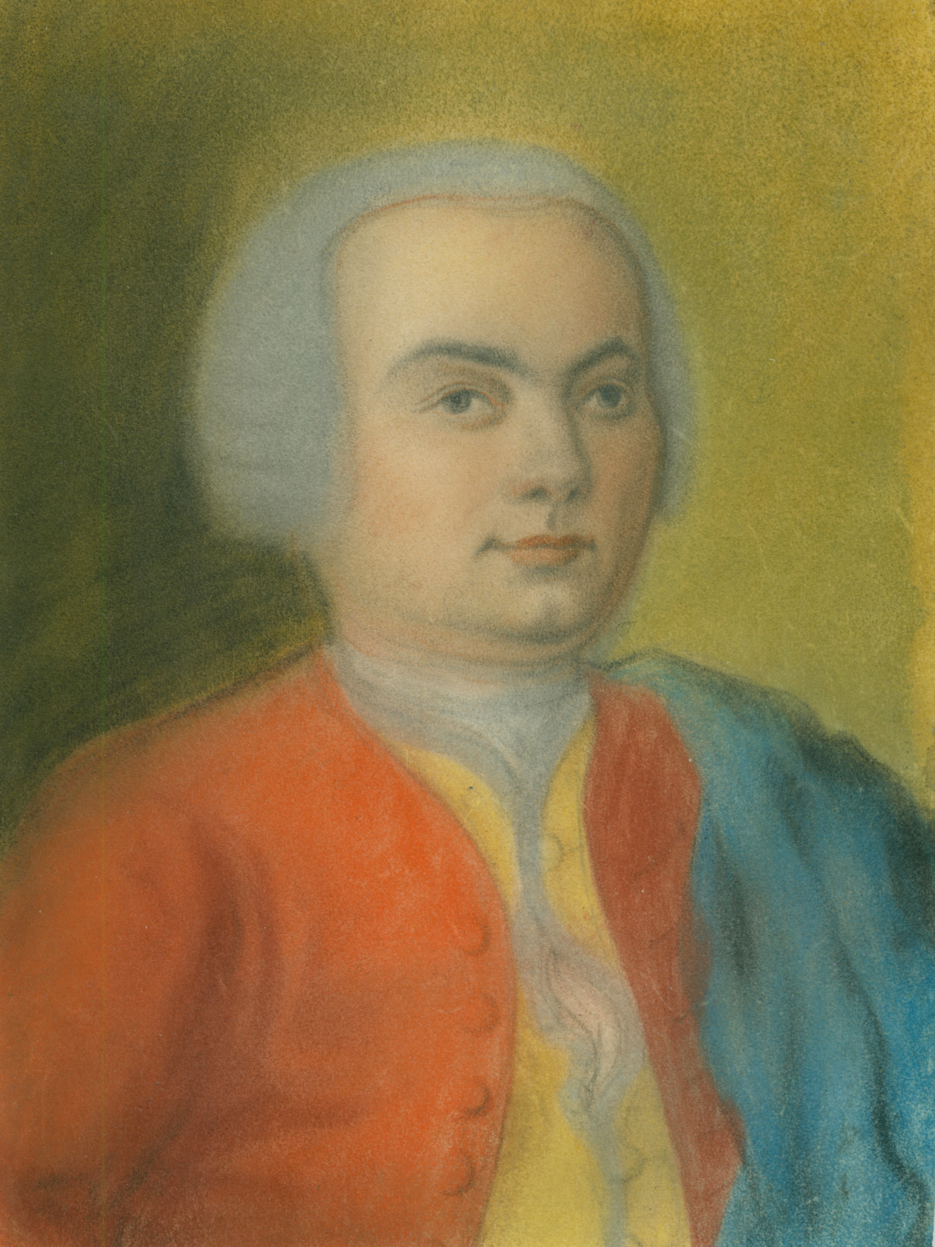 Pastellbildnis Carl Philipp Emanuel Bachs von Gottlieb Friedrich Bach um 1733.